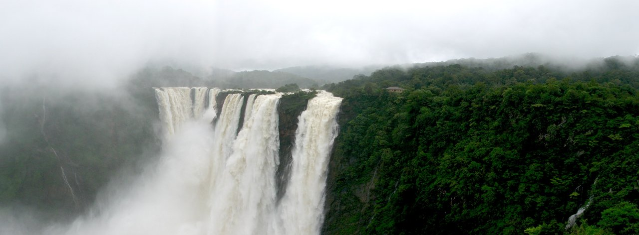 Jog Falls